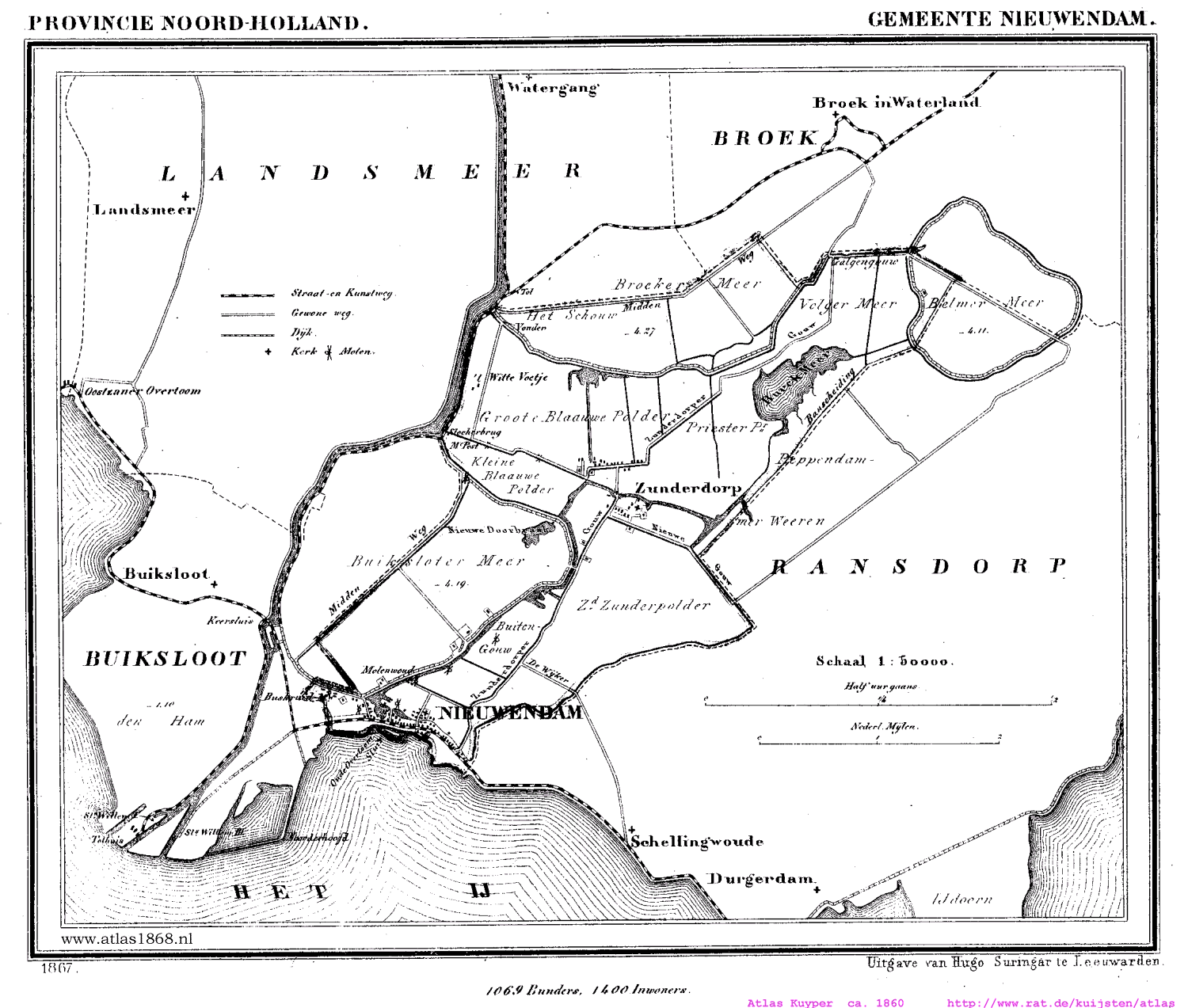 Kaart van Nieuwendam uit Gemeente Atlas van Nederland, J. Kuyper 1865-1870, Uitgave Hugo Suringar Leeuwarden.